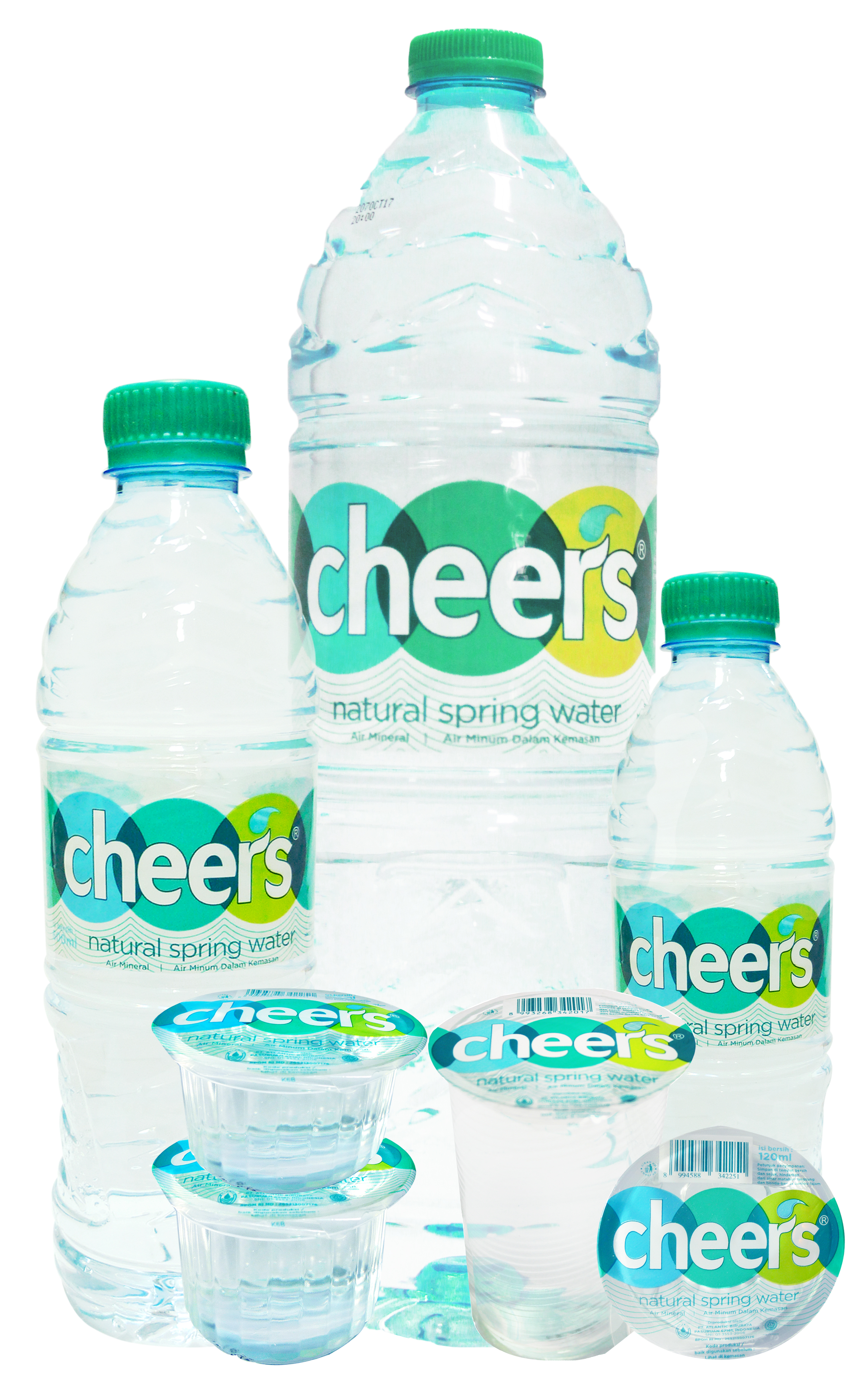 Produk Cheers Natural